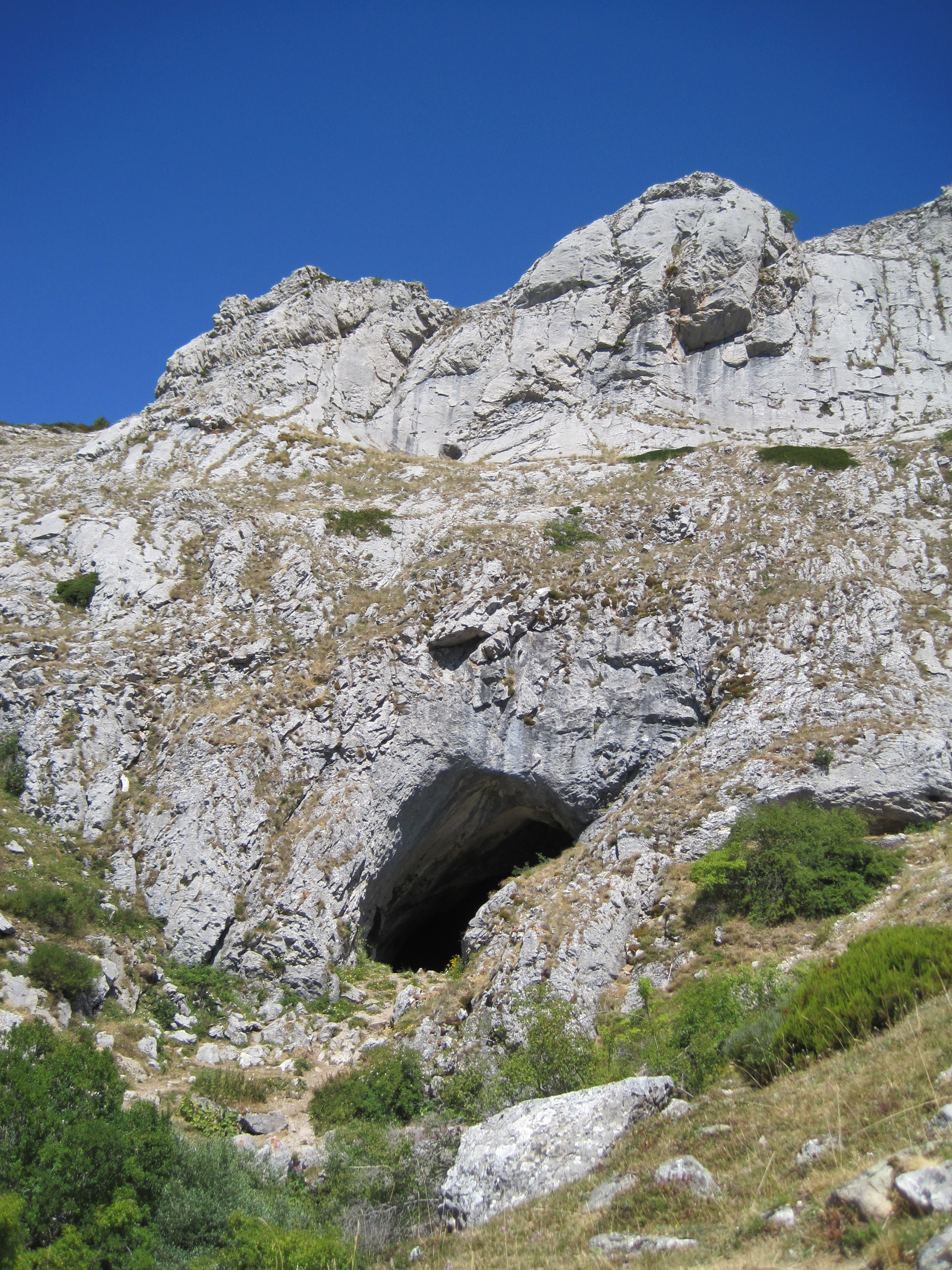 Entrada a la cueva del Cobre, al norte de la provincia de Palencia (España).